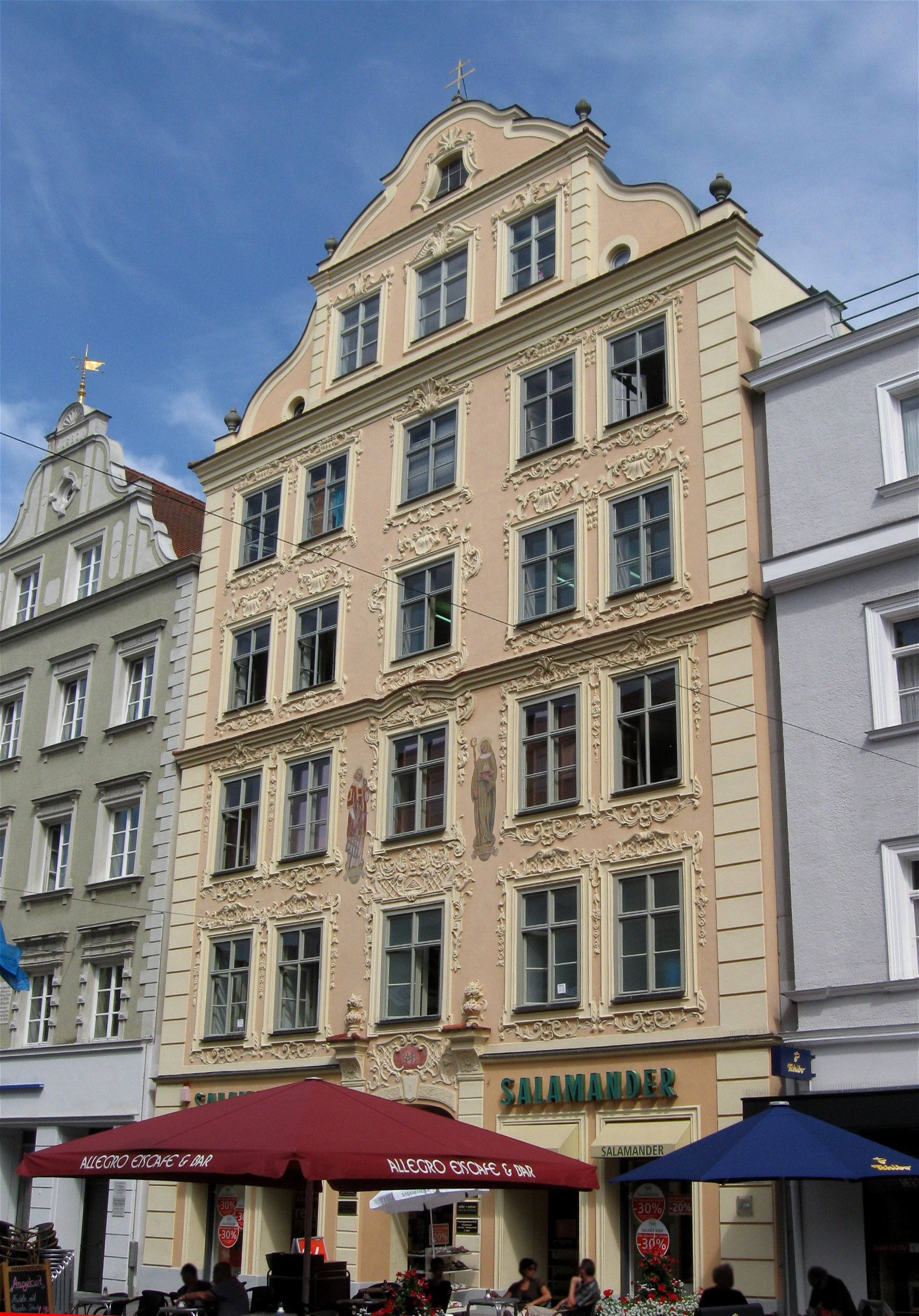 Ludwigstraße 5; Ickstatthaus, Fassade des Wohn- und Geschäftshauses, fünfgeschossig mit geschweiftem Knickgiebel und reicher Stuckierung mit Rocaillen und vegetabilen Formen, 1746, nach Entkernung wiedereingebautes barockes Treppenhaus sowie hofseitige Front und teilweise tonnengewölbte Kellerräume des mittelalterlichen Vorgängerbaus. D-1-61-000-254